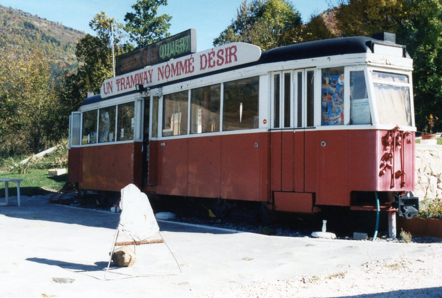 Sauf erreur de ma part, c'est l'ancien Tram de Lucerne no 107, devenue le tram de Genève no 737, puis il a été transformé dans les années 1970 en remorque no 327, puis en Restaurant elle était placée au bord de la route Napoléon dans le village La salle en Beaumont après Grenoble. Cette photo a été prise dans les années 1990, je ne sais pas si elle existe encore à ce jour, renseignements bienvenus.